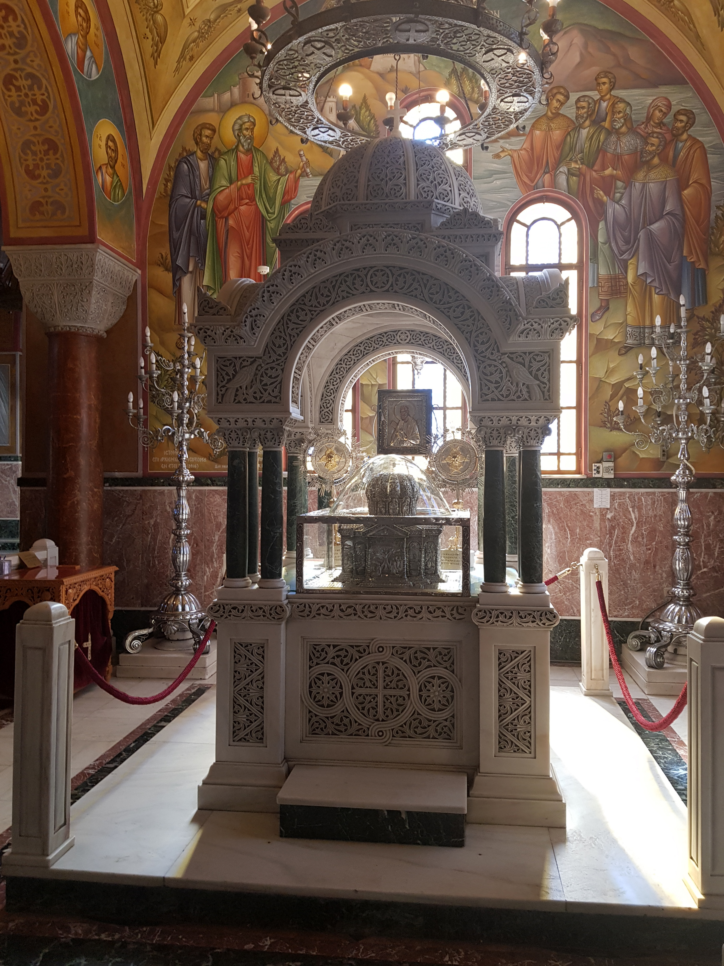 Ιερός ναός Αγίου Ανδρέα«Ιερός ναός Αγίου Ανδρέα»